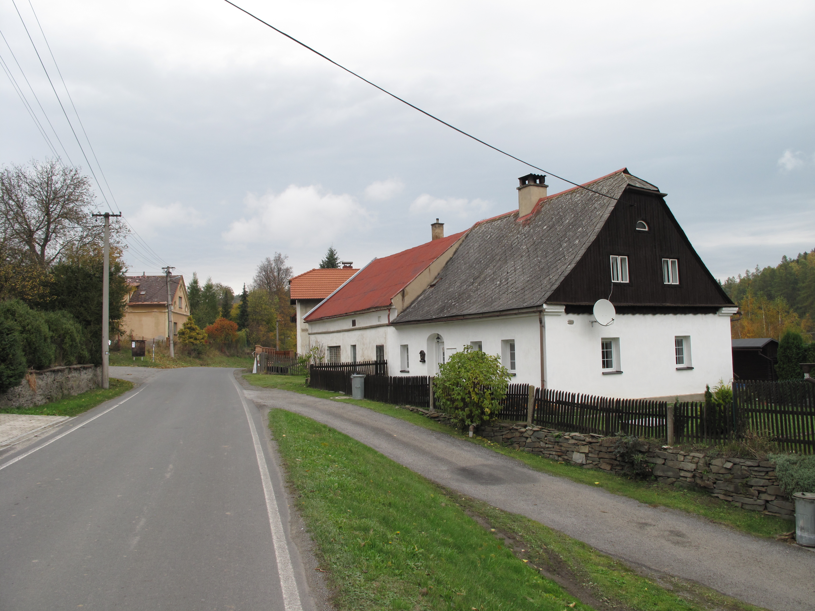 Radim (Brantice). Okres Bruntál, Česká republika.